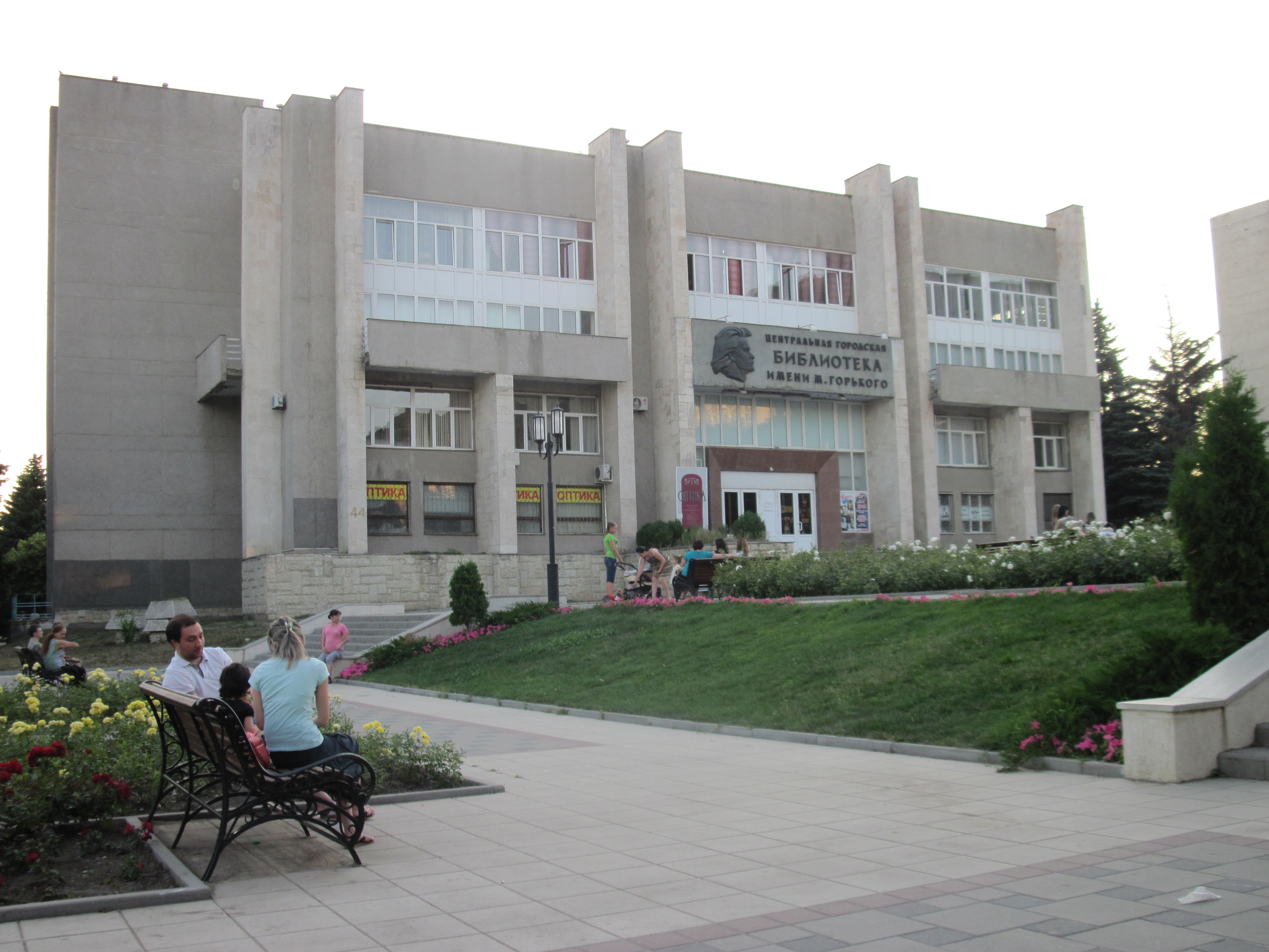 Библиотека в Пятигорске